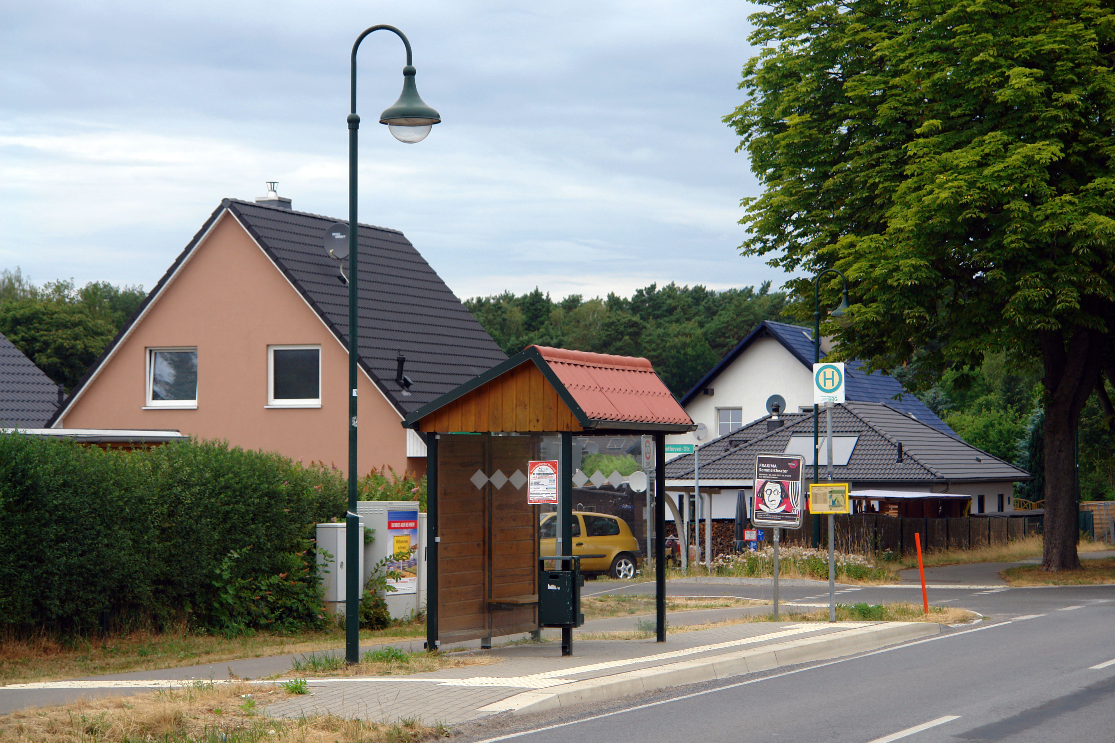 Die Bushaltestelle in Birkholzaue an der Bernauer Chaussee Ecke Beethovenstraße.